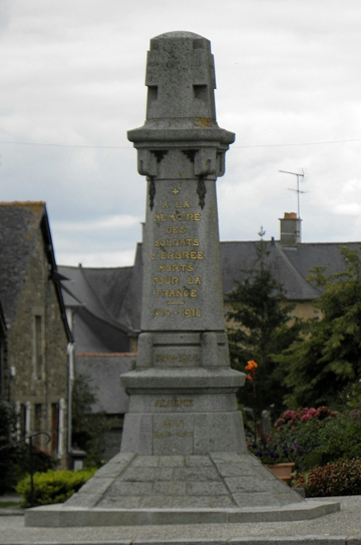 Monument aux morts d'Erbrée (Ille-et-Vilaine, France).